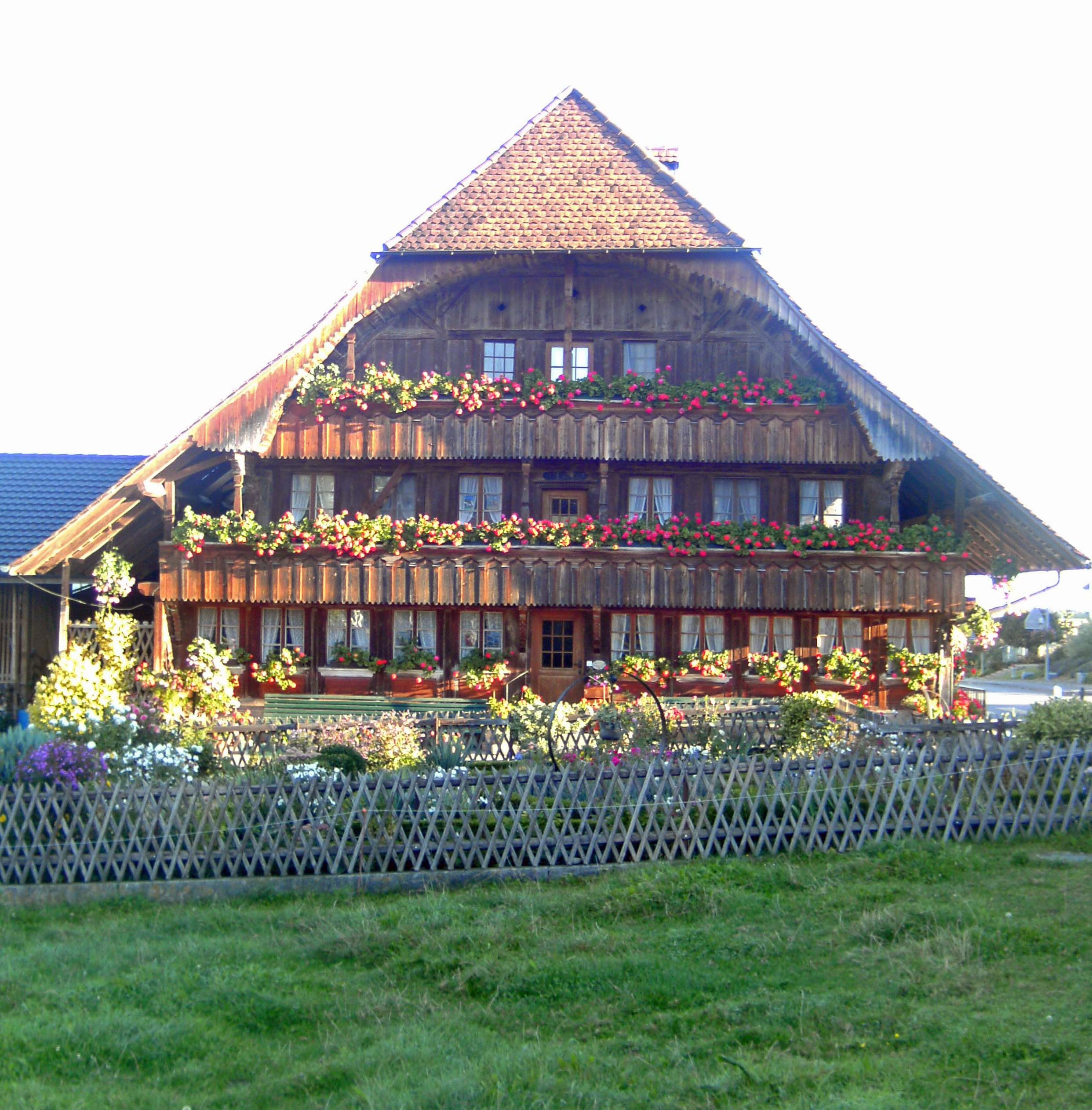 Ferme à Schmitten